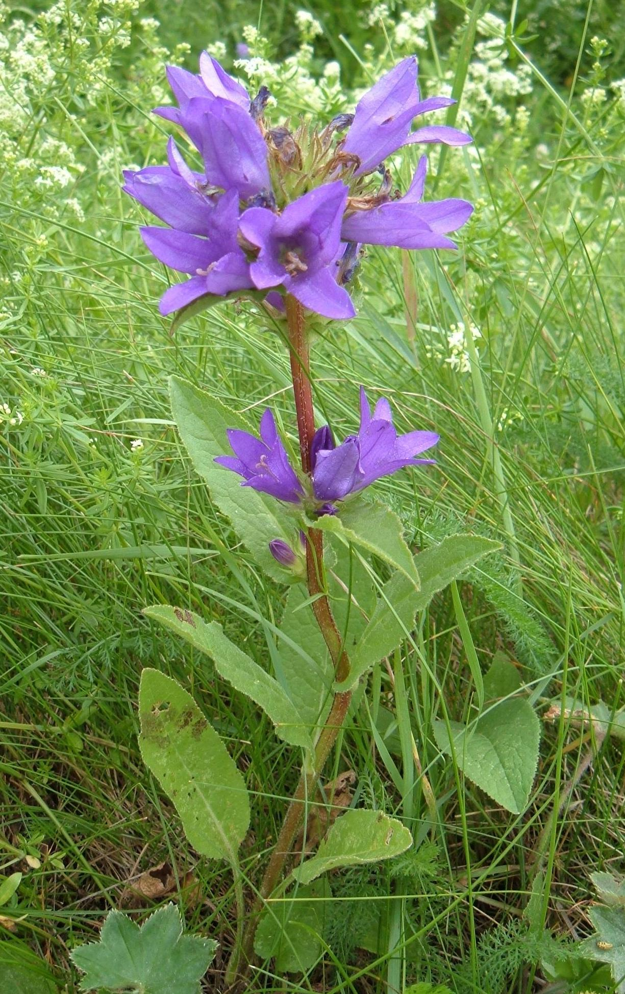 Campanula glomerata